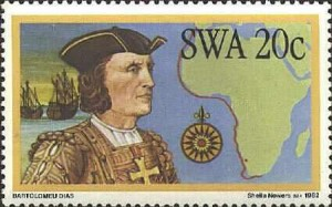 Dias uitgebeeld op ‘n posseël van Suidwes-Afrika